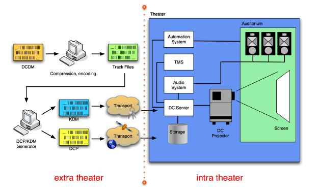 Sistema Tipico DCI